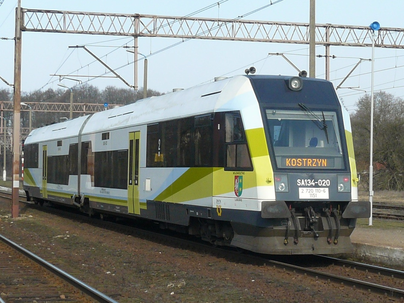 SA134-020 z Poznania do Kostrzyna na stacji Drawski Młyn